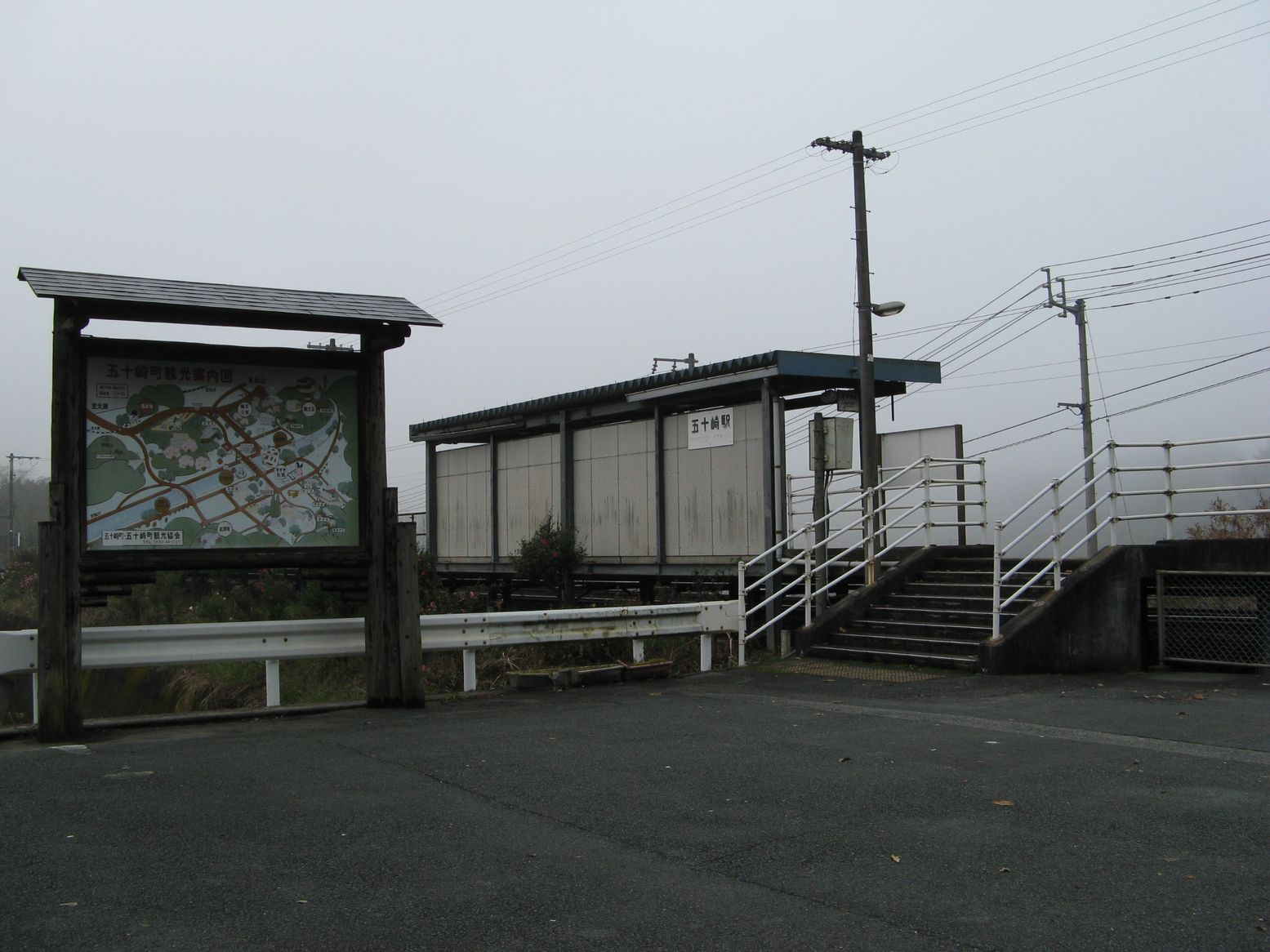 予讃線五十崎駅